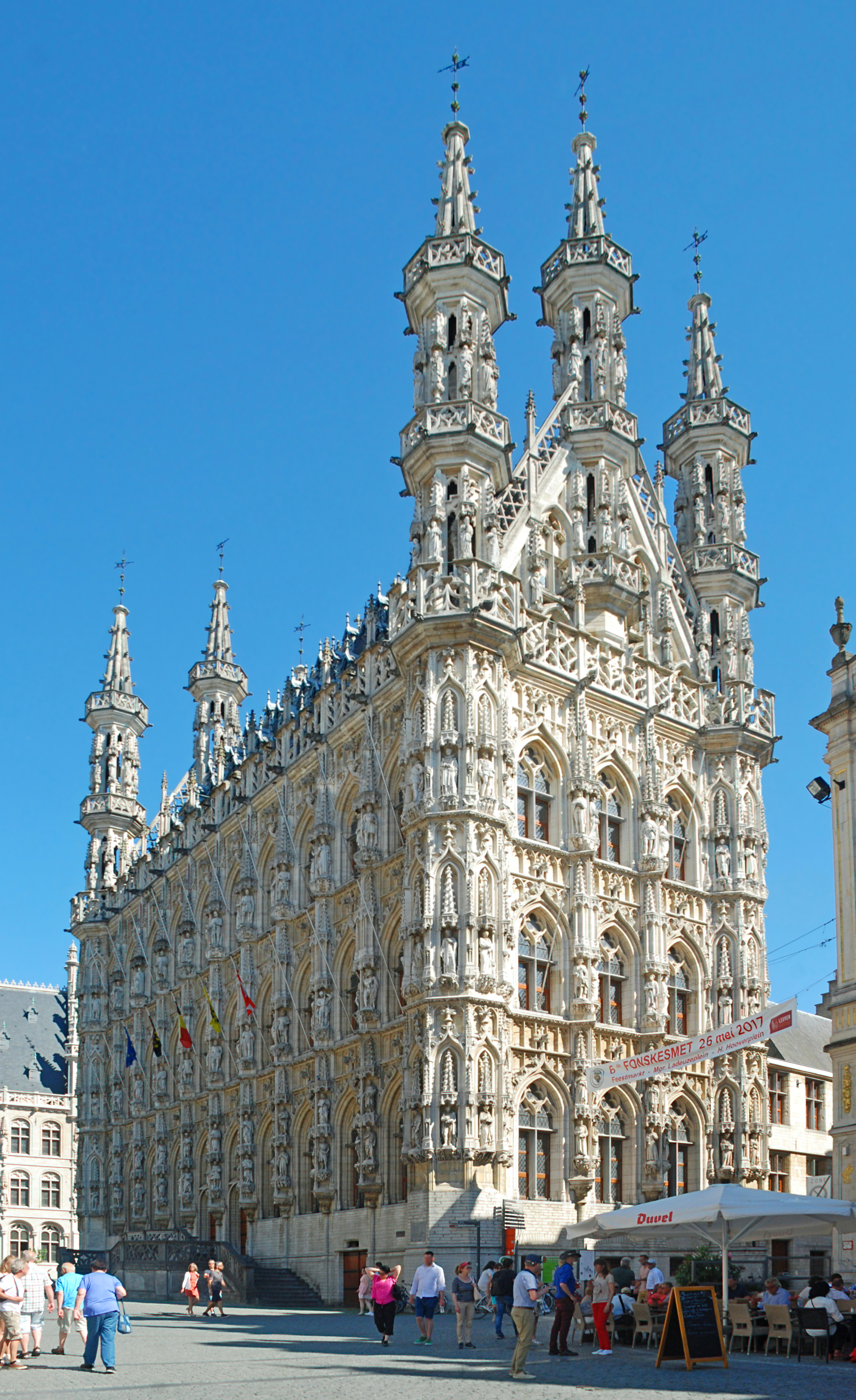 Belgique - Brabant flamand - Louvain - Hôtel de Ville